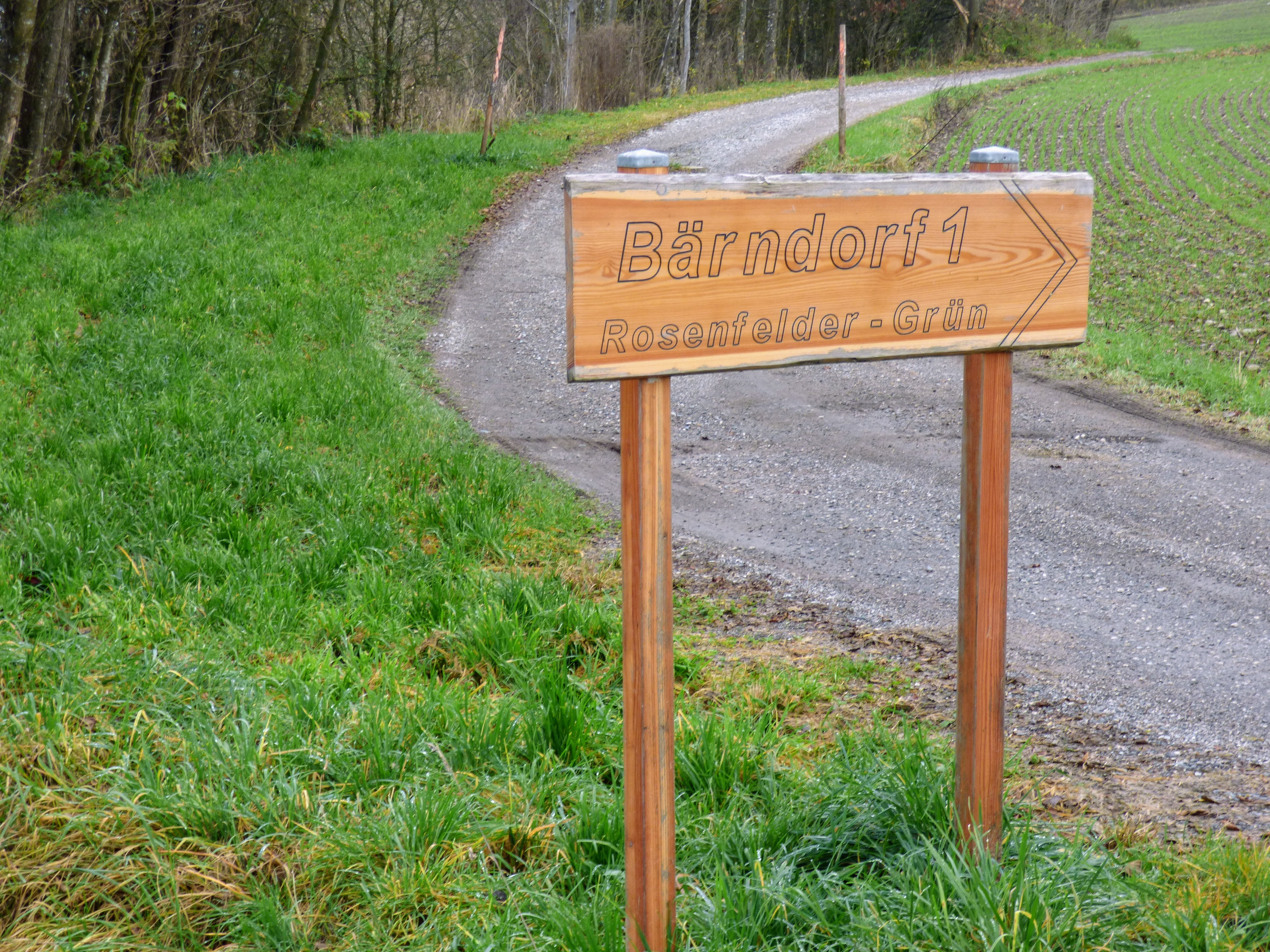 Wegweiser nach Bärndorf, Gemeinde Liebenfels